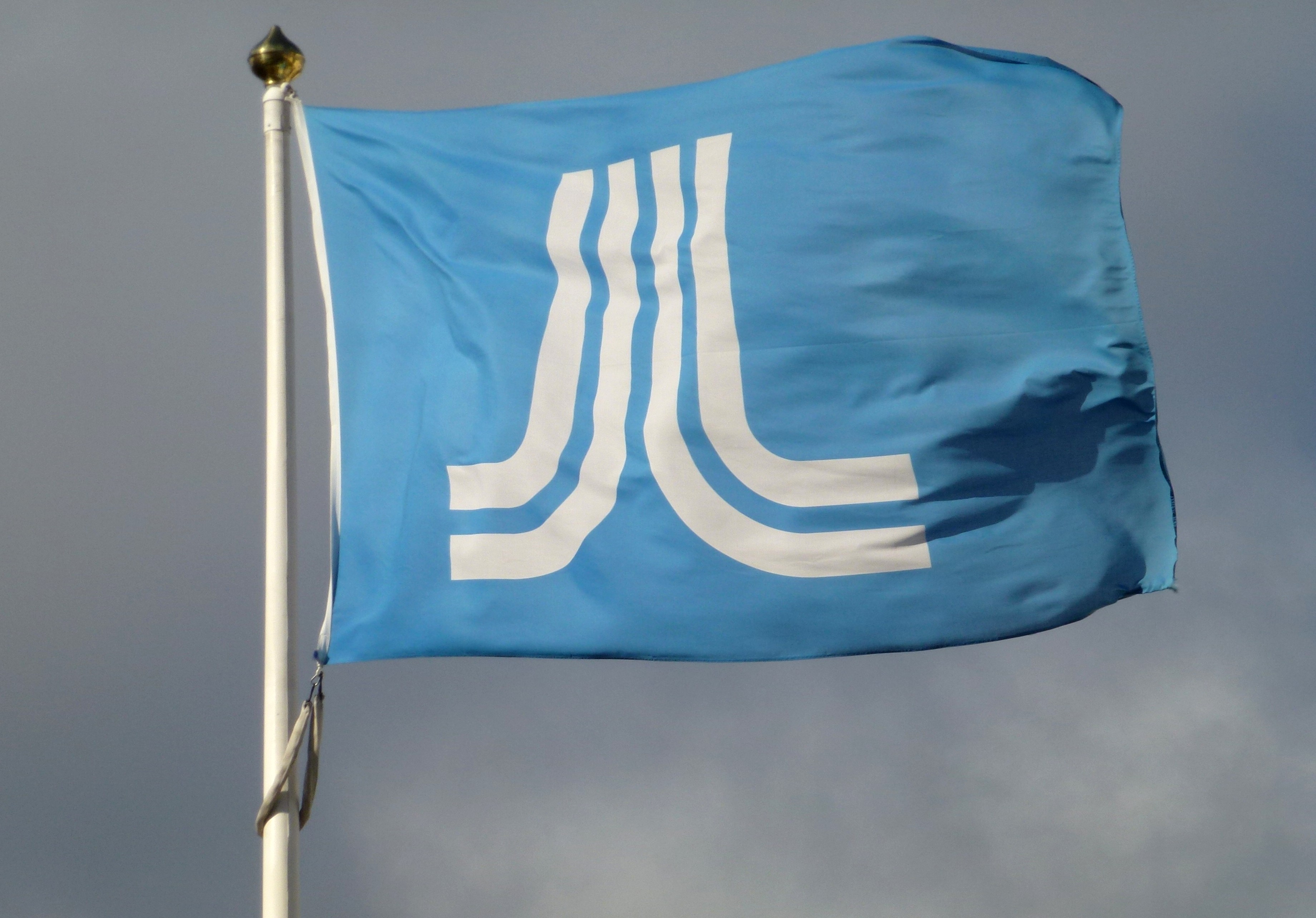 Landstingsflaggan 2012